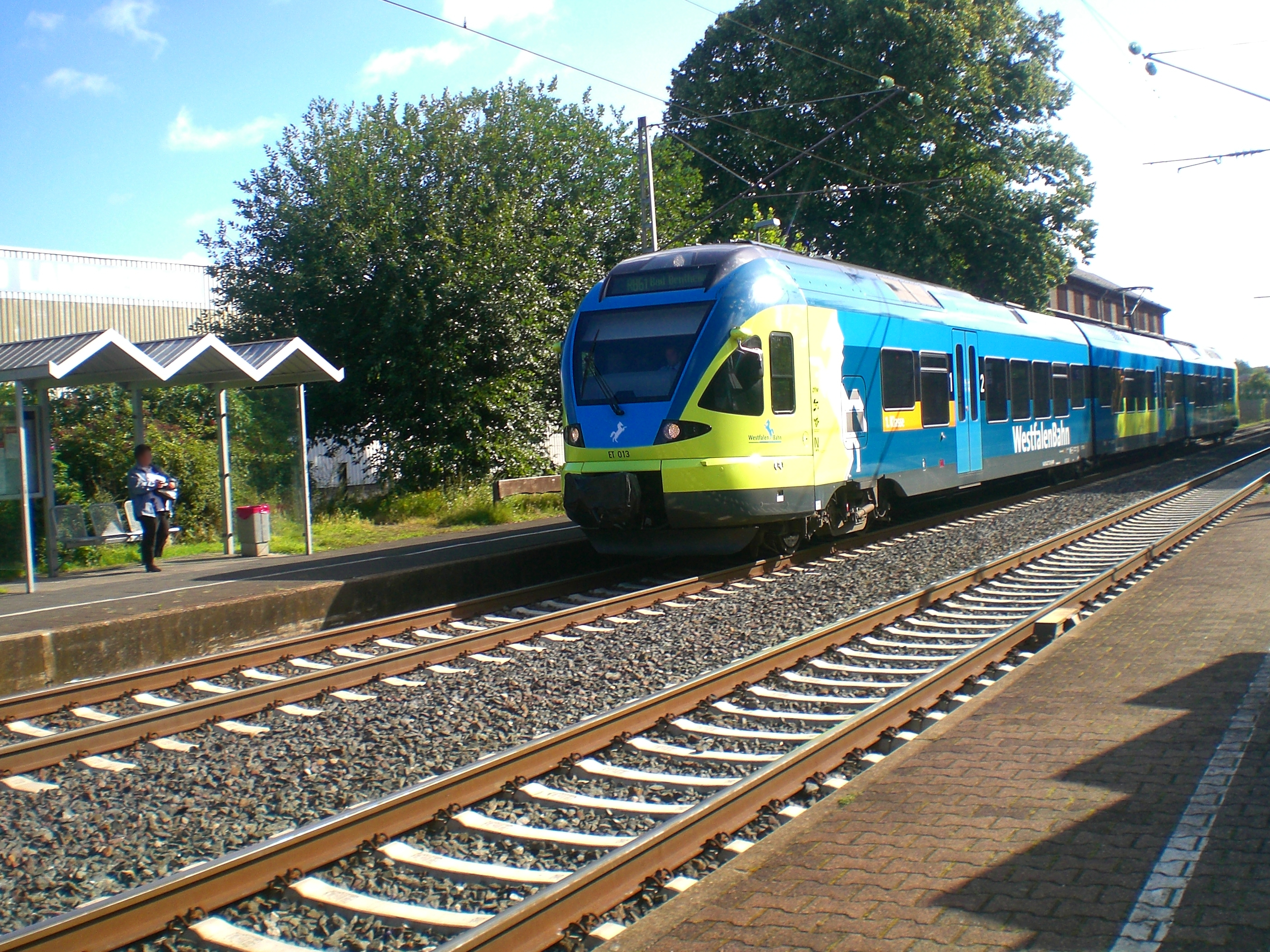 Westfalenbahn im Schüttorfer Bahnhof